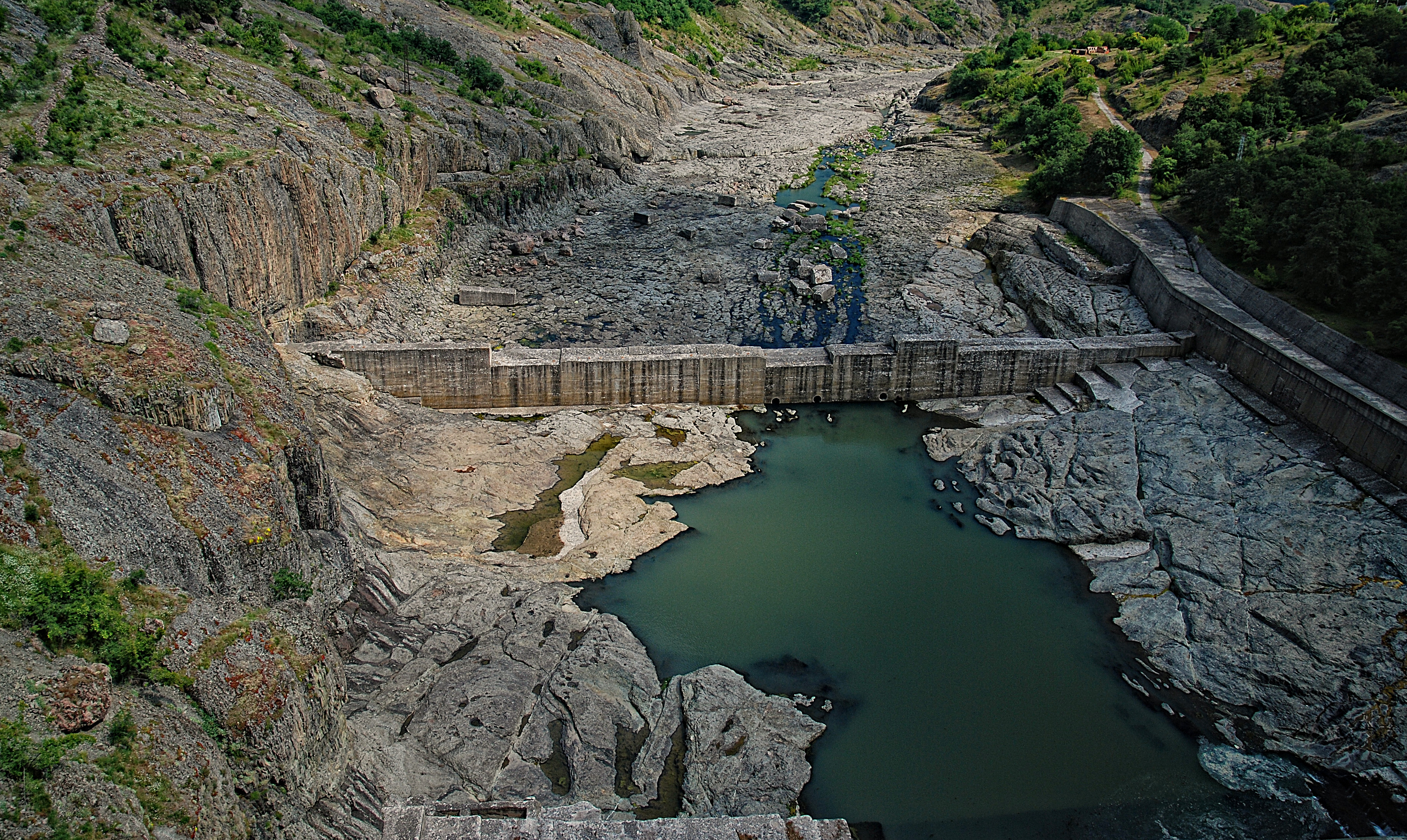 Вълчи дол